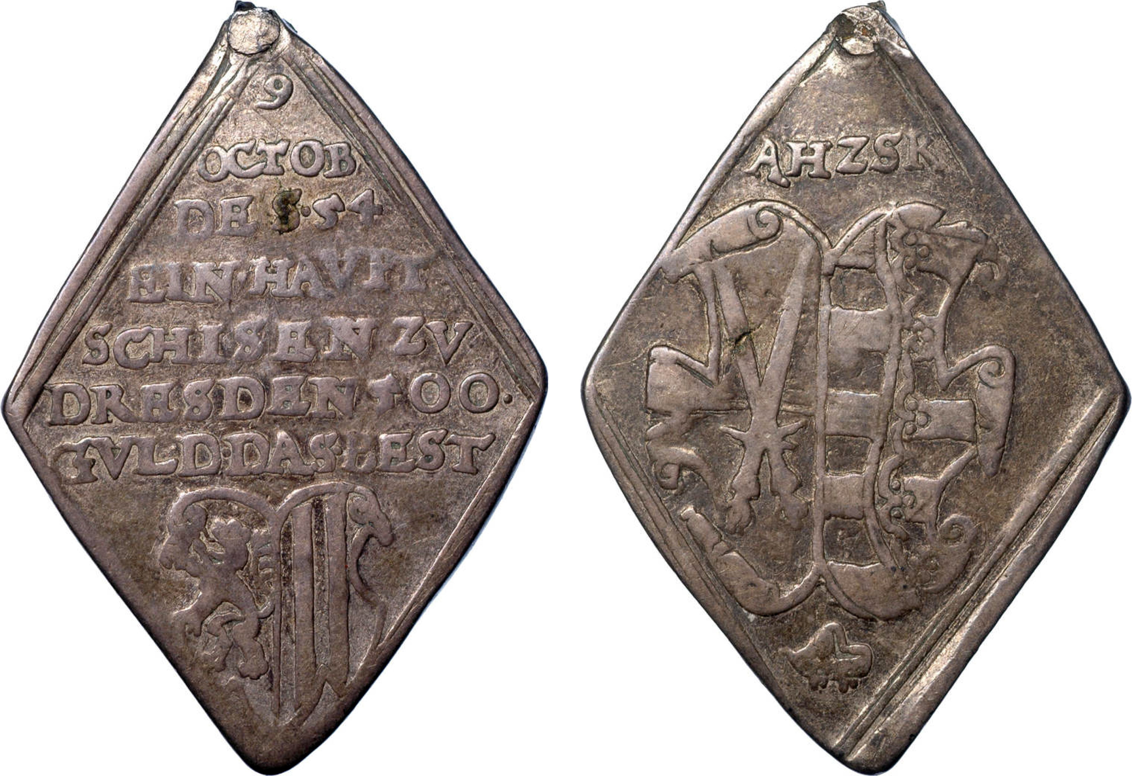 Schießklippe – Schießen zur Einweihung des Rats-Schießhauses in Dresden am 9. Oktober 1554, Münzmeister: Leupold Holzschucher, Silber.